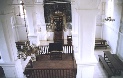 Wnętrze synagogi żydowskiej w Bobowej, fot. Bogusław Bogusz, 2004r.